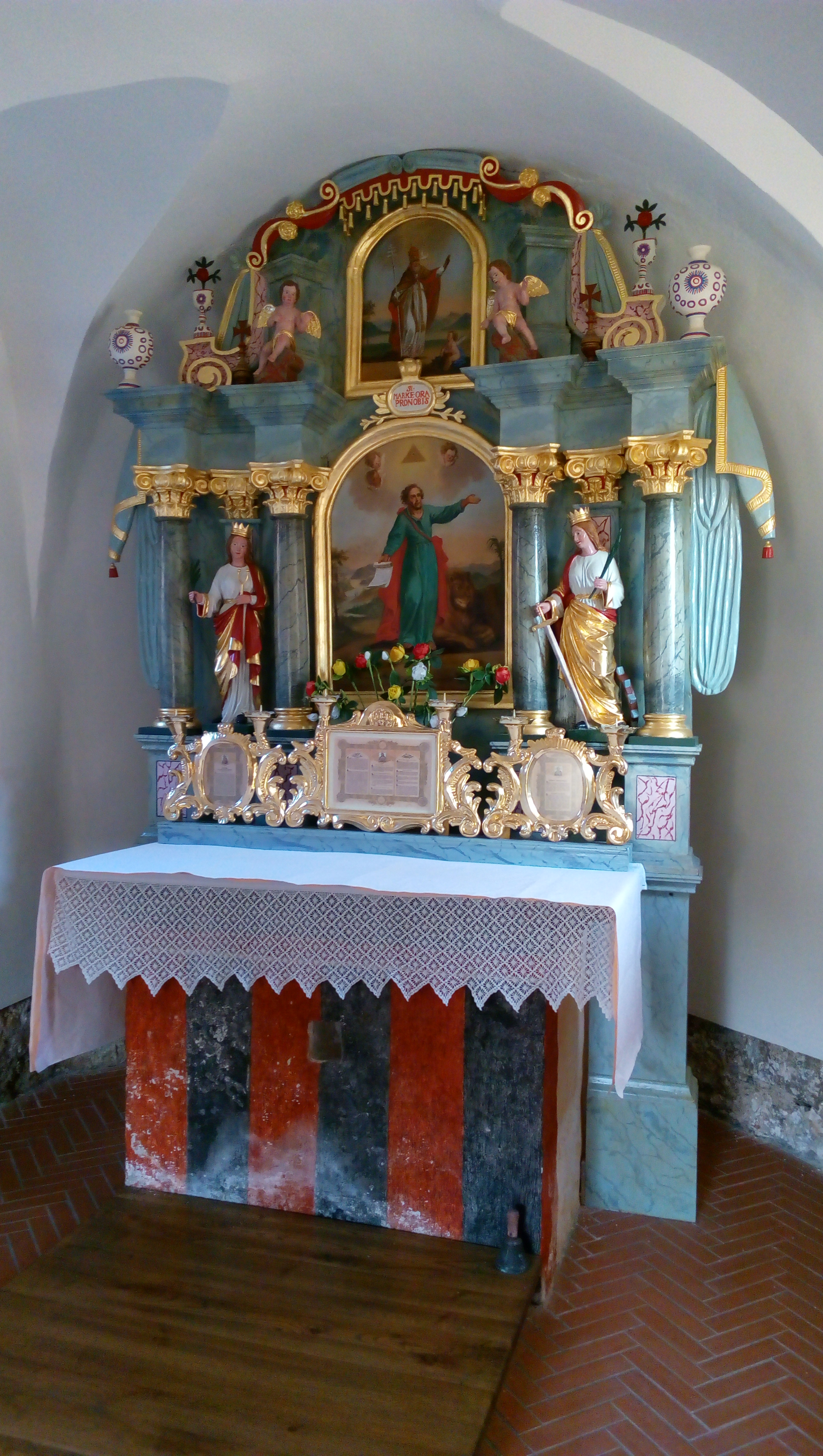 Oltar sv. Marko